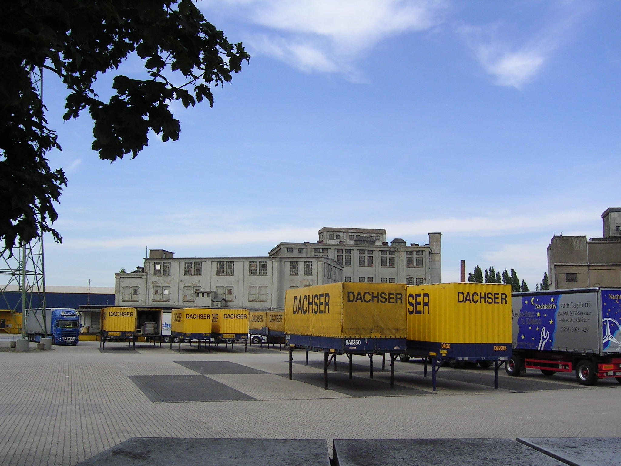 Dachser Neuss Swap Bodies